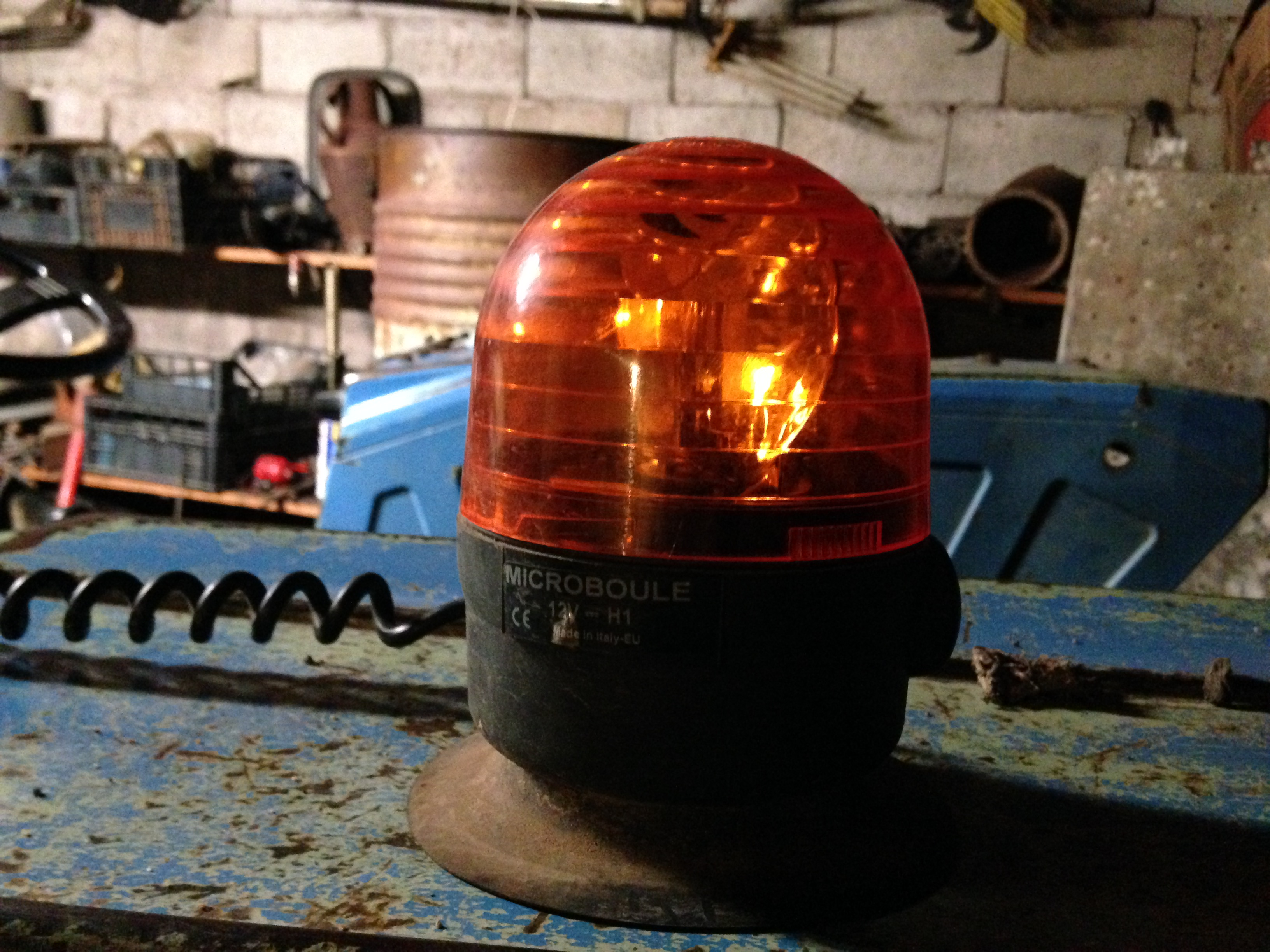 Girofaro arancione montato su un trattore